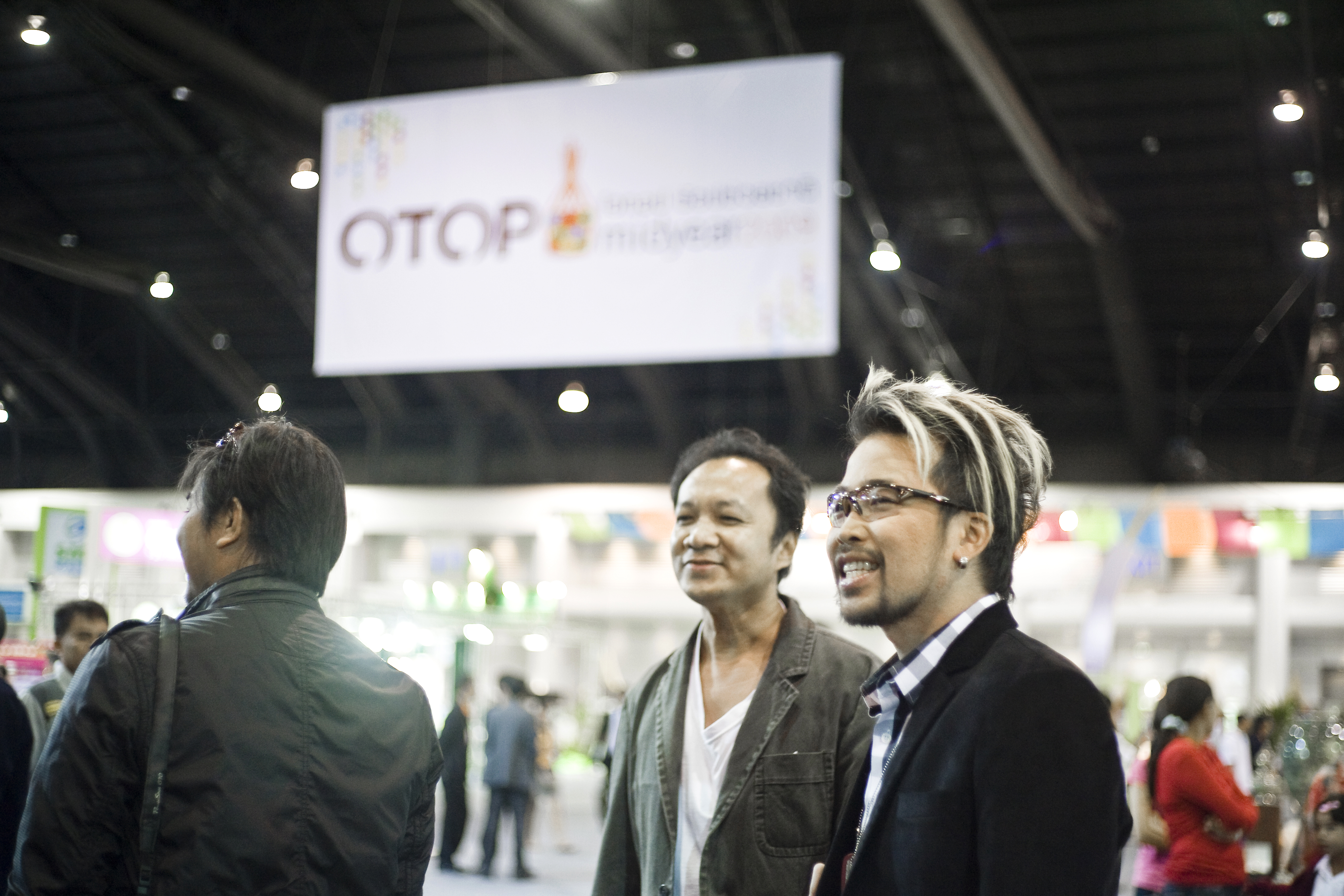 เกตุเสพย์สวัสดิ์ ปาลกะวงศ์ ณ อยุธยา / เชื่อมั่นประเทศไทยฯ IMPACT 23 สิงหาคม 2552 (The Official Site of The Prime Minister of Thailand Photo by พีรพัฒน์ วิมลรังครัตน์)